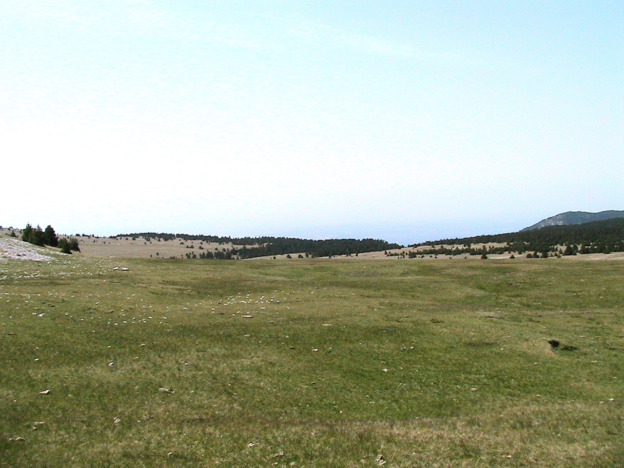 Els verds prats s'extenen en una extensió d'uns 1,5 Km quadrat i una superfície quasi plana.